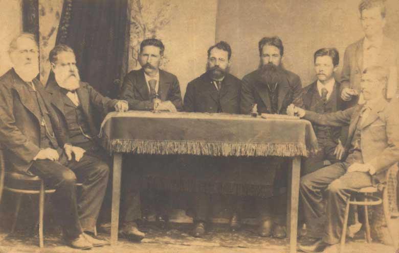 coselho municipal